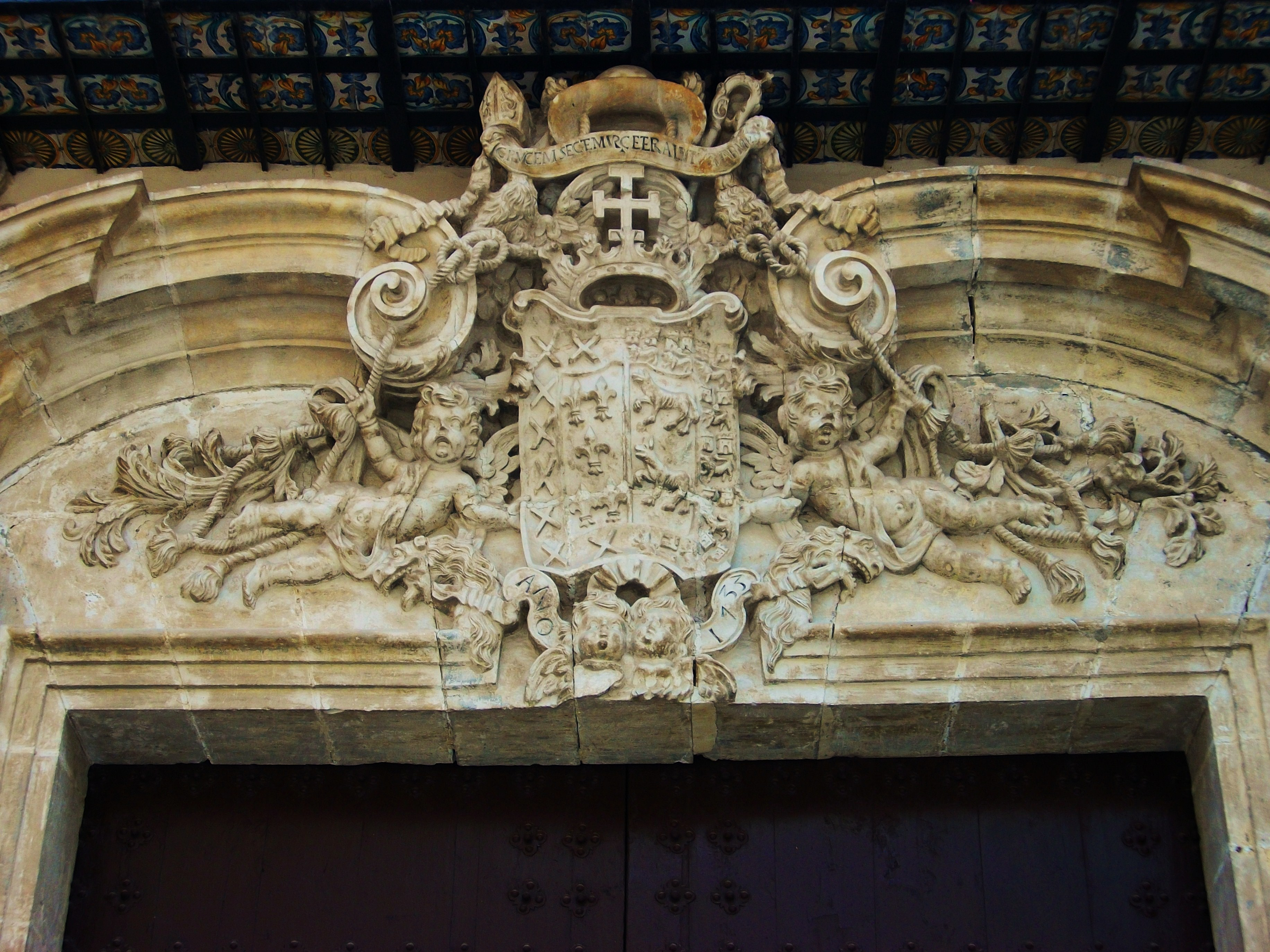 Escut del Palau Episcopal d'Oriola.